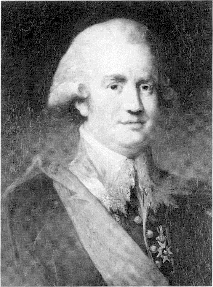 Friherre Schering Rosenhane